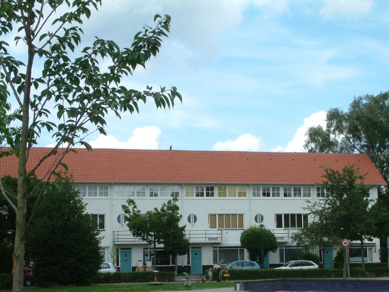 Tuindorp, Witte Dorp, in Eindhoven, Burghplein, monument